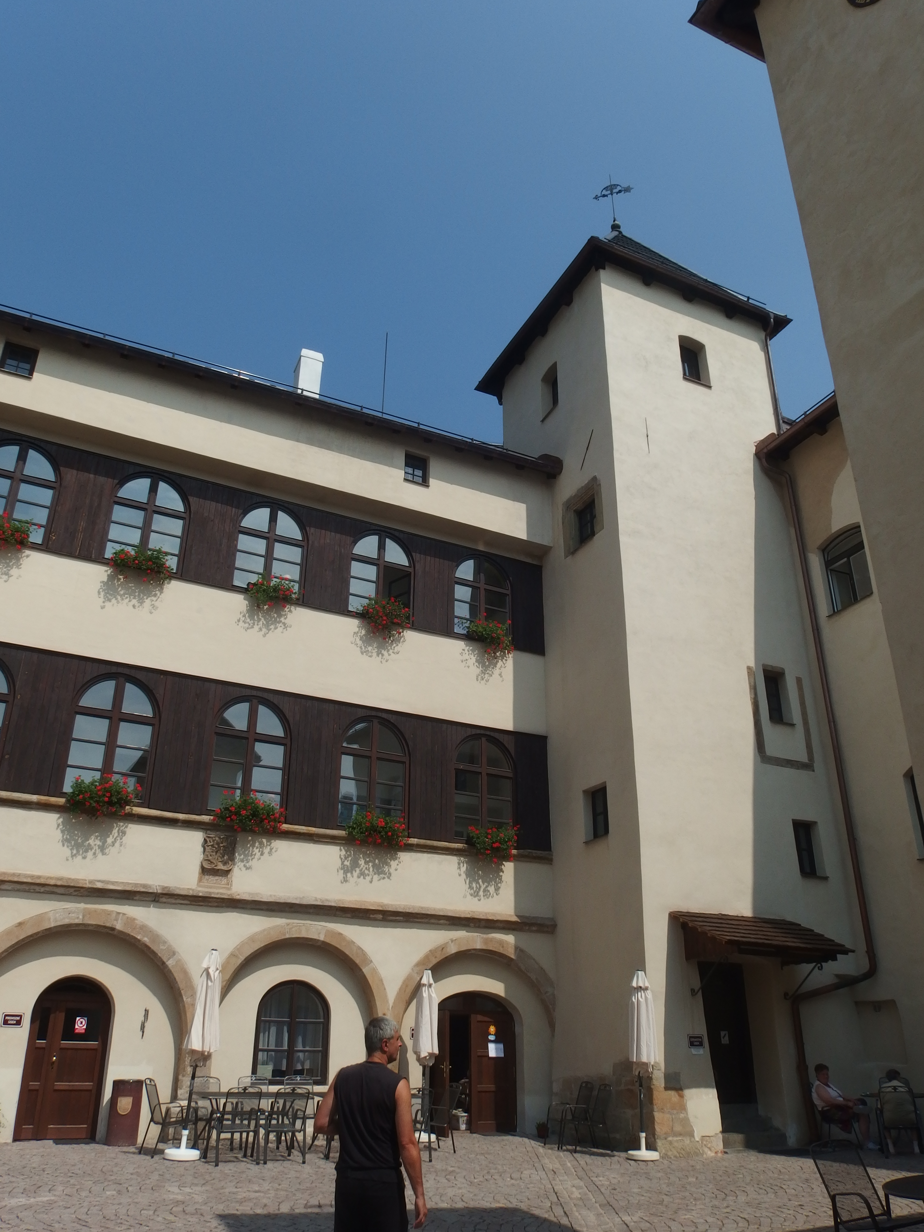 Předhradí (okres Chrudim), okres Chrudim, Česká republika. Hrad Hrad Rychmburk, Předhradí 17.